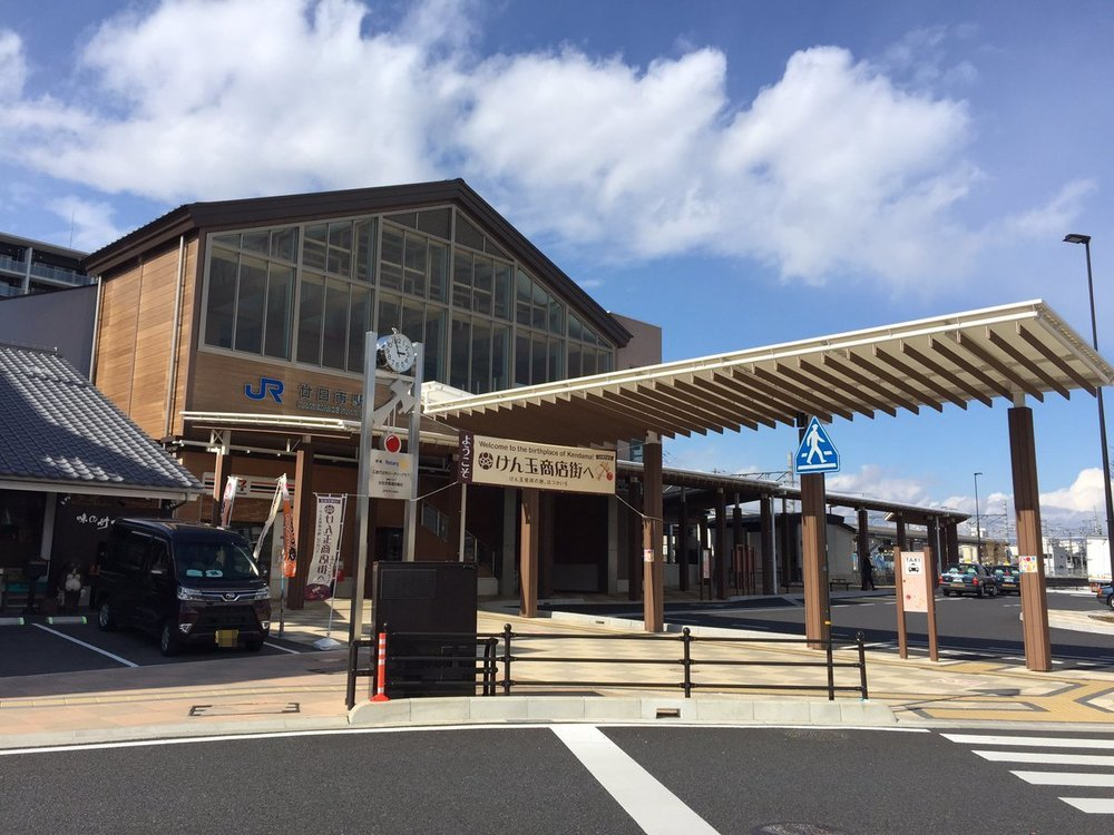 廿日市駅南口駅舎